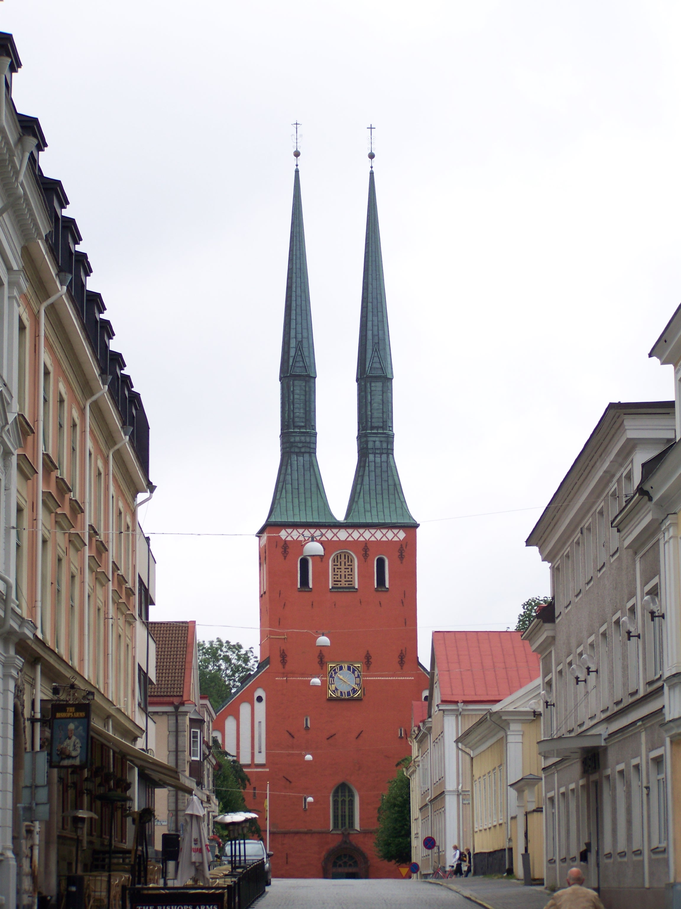 In Schweden. Dom in Växjö